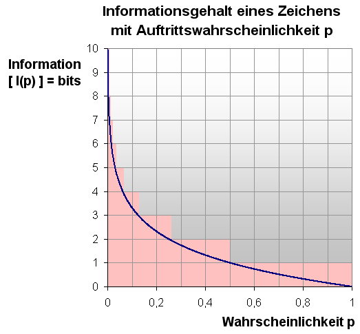 Informationstheorie - Entropie: Informationsgehalt eines Zeichens für diskrete Auftrittswahrscheinlichkeit information theorie - entropy: Amount of information of a sign